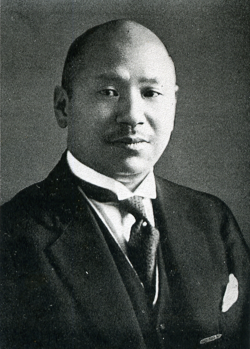 この写真は、加藤久米四郎（1884-1939）の写真です。